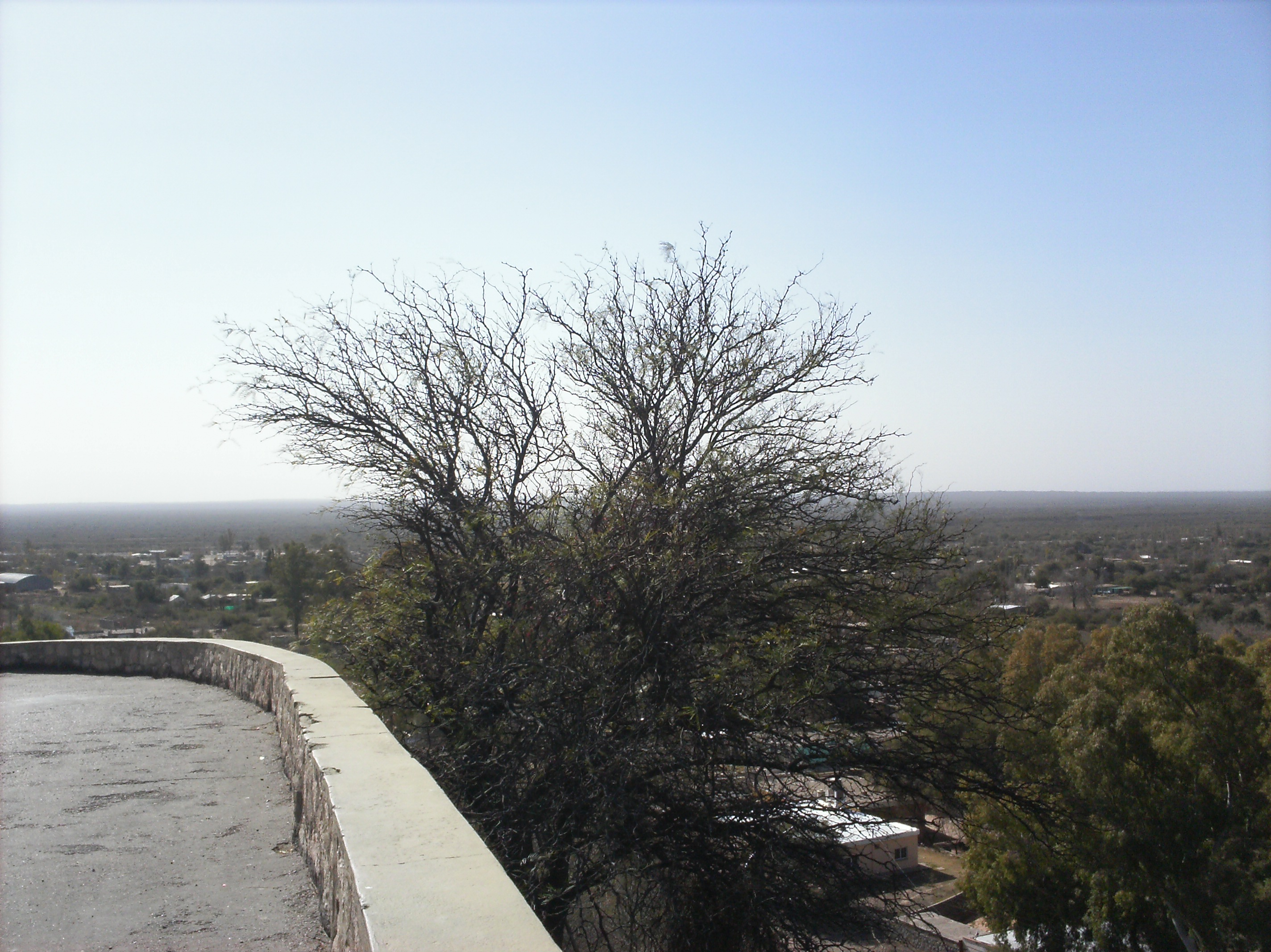 san agustin vista panoramica